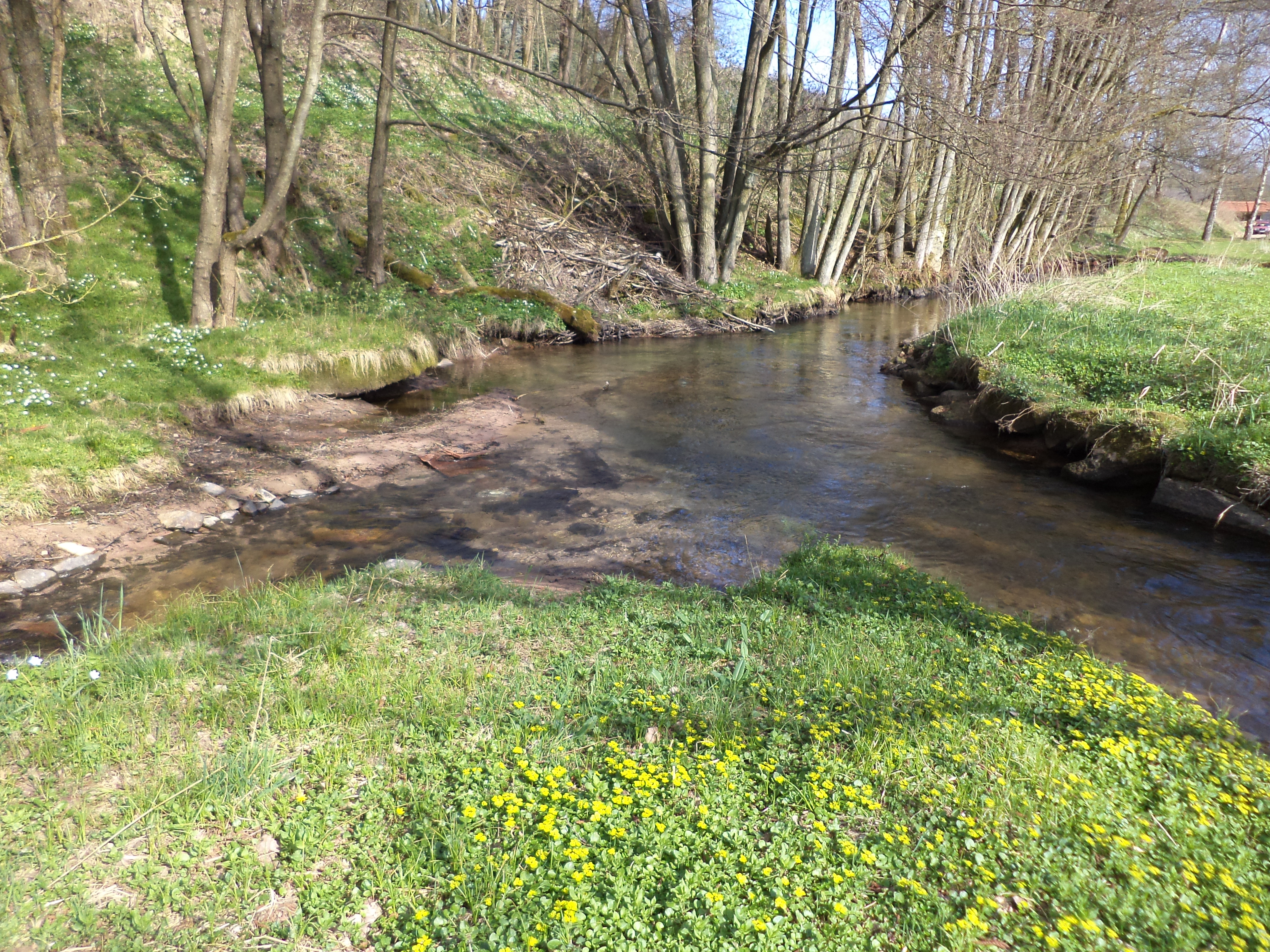 Der Breitenbach (links) mündet in die Jossa (von rechts nach hinten)